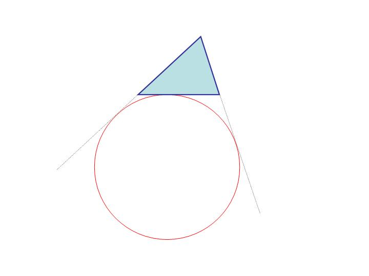 Eigen tekening, t.b.v. artikel over Aangeschreven cirkel.